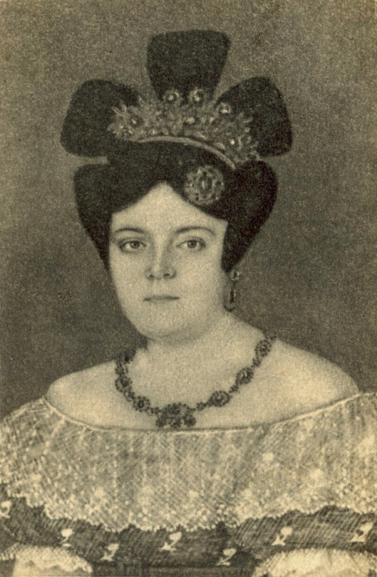 Retrator de María del Carmen Moya y Bayu, segunda condesa de Santa Ines Santiago de Cuba, Cuba SIGLO XVIII - XIX Eder Isaac R. Chiunti